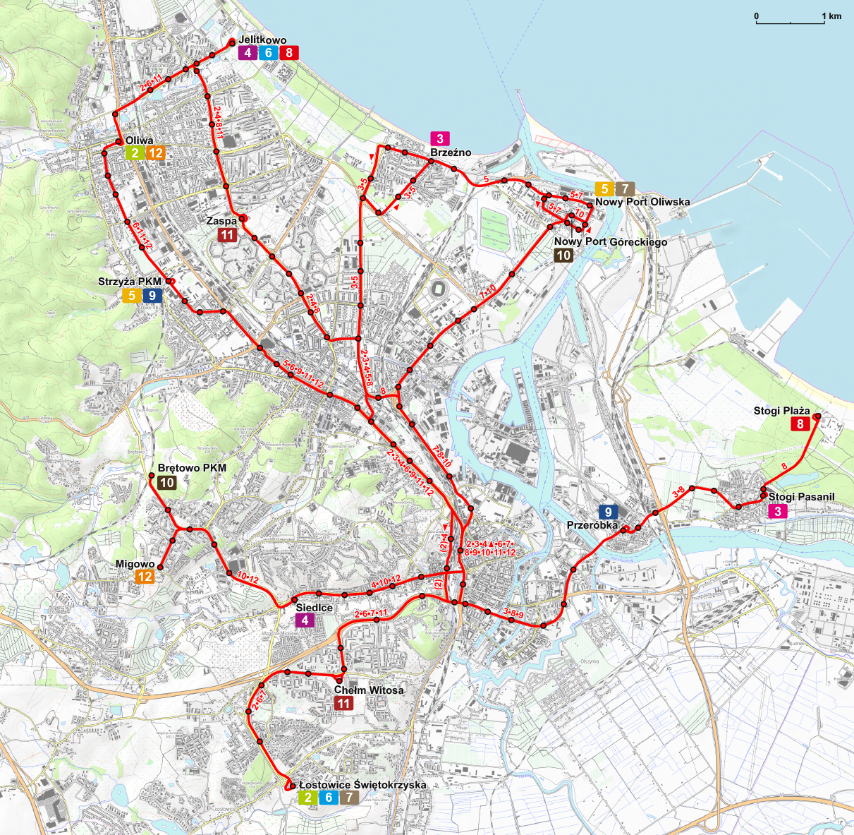 Streckennetz der Straßenbahn Danzig 2015